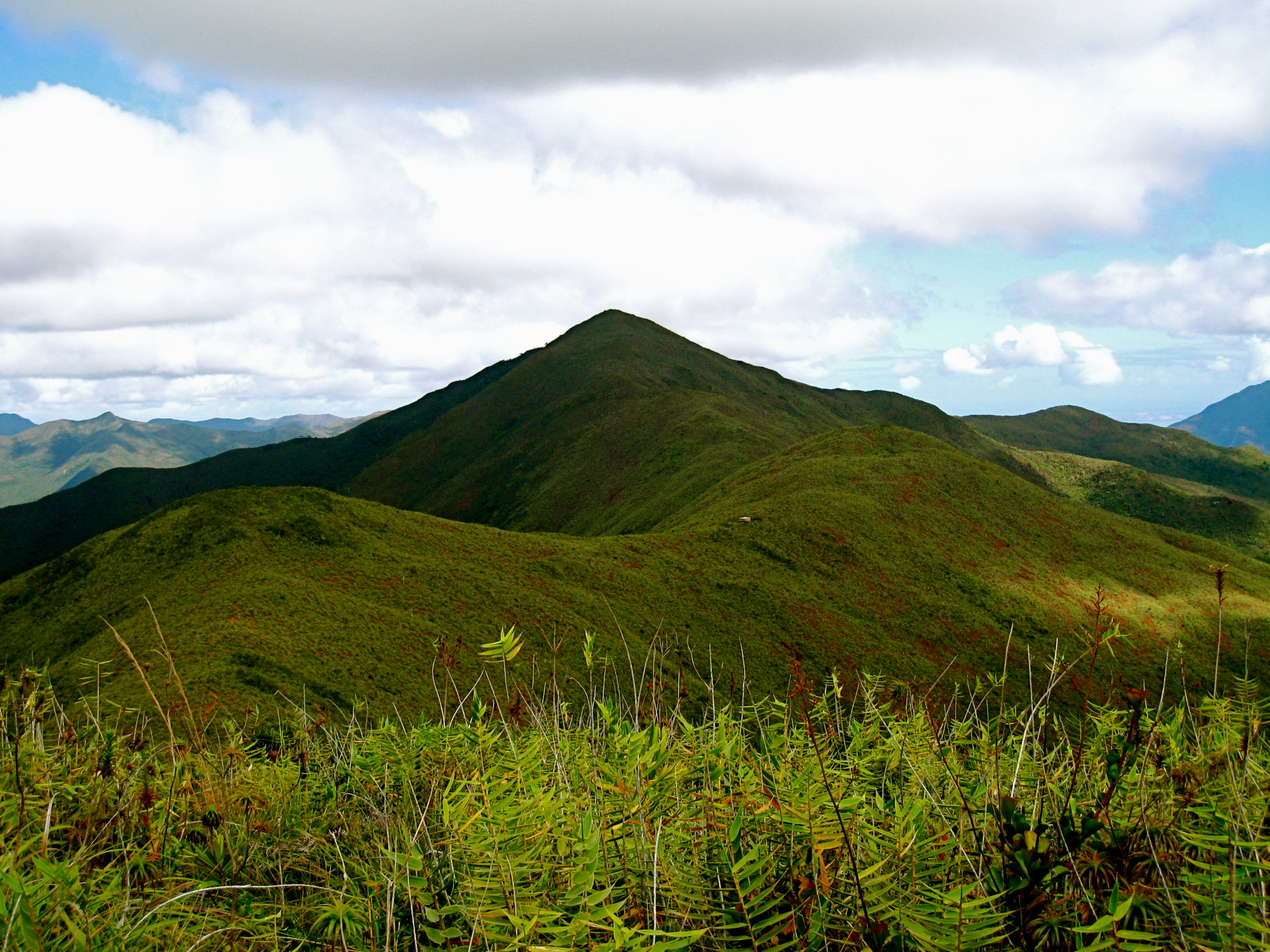 Mont Humboldt - Crête